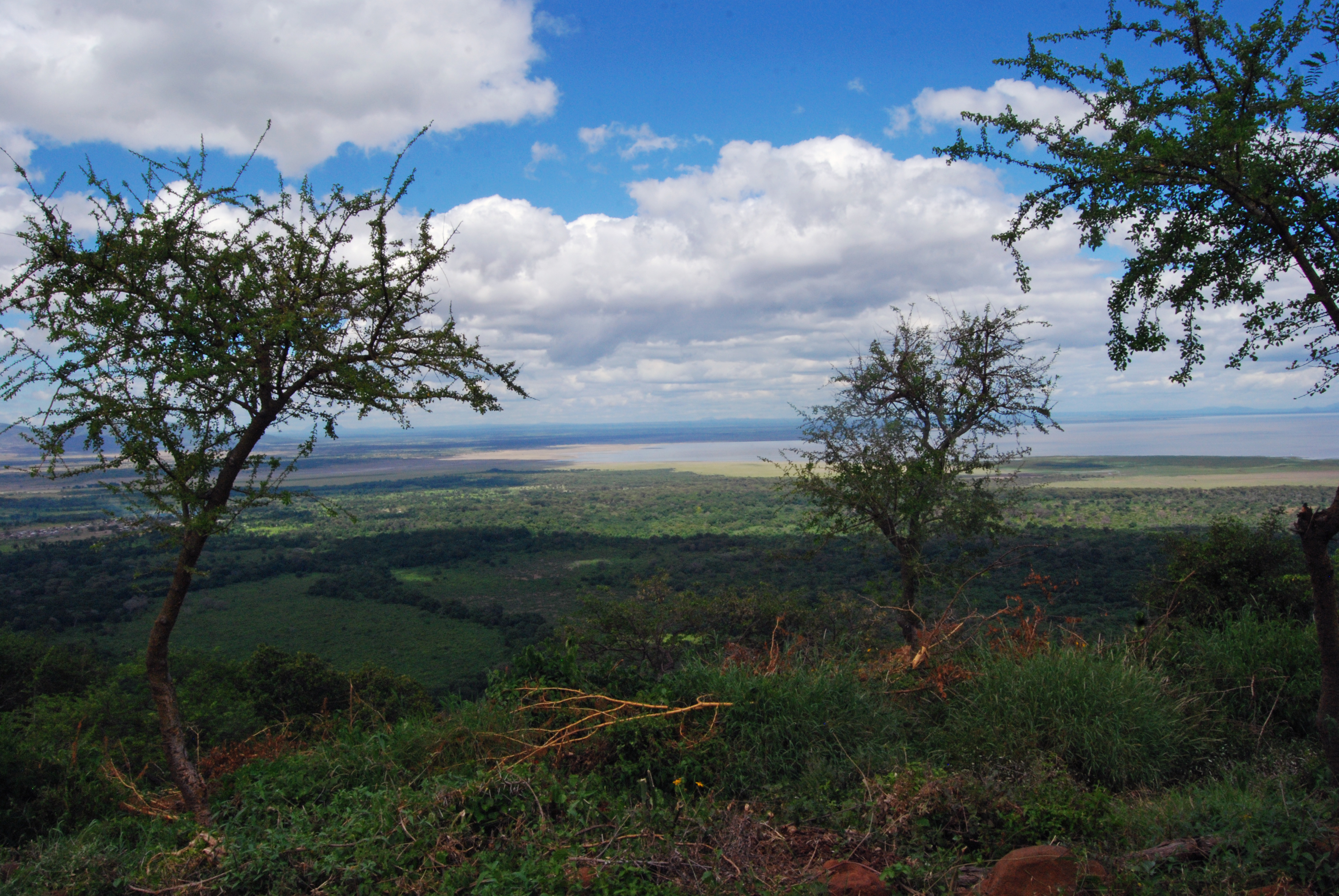 Lake Manyara National Park